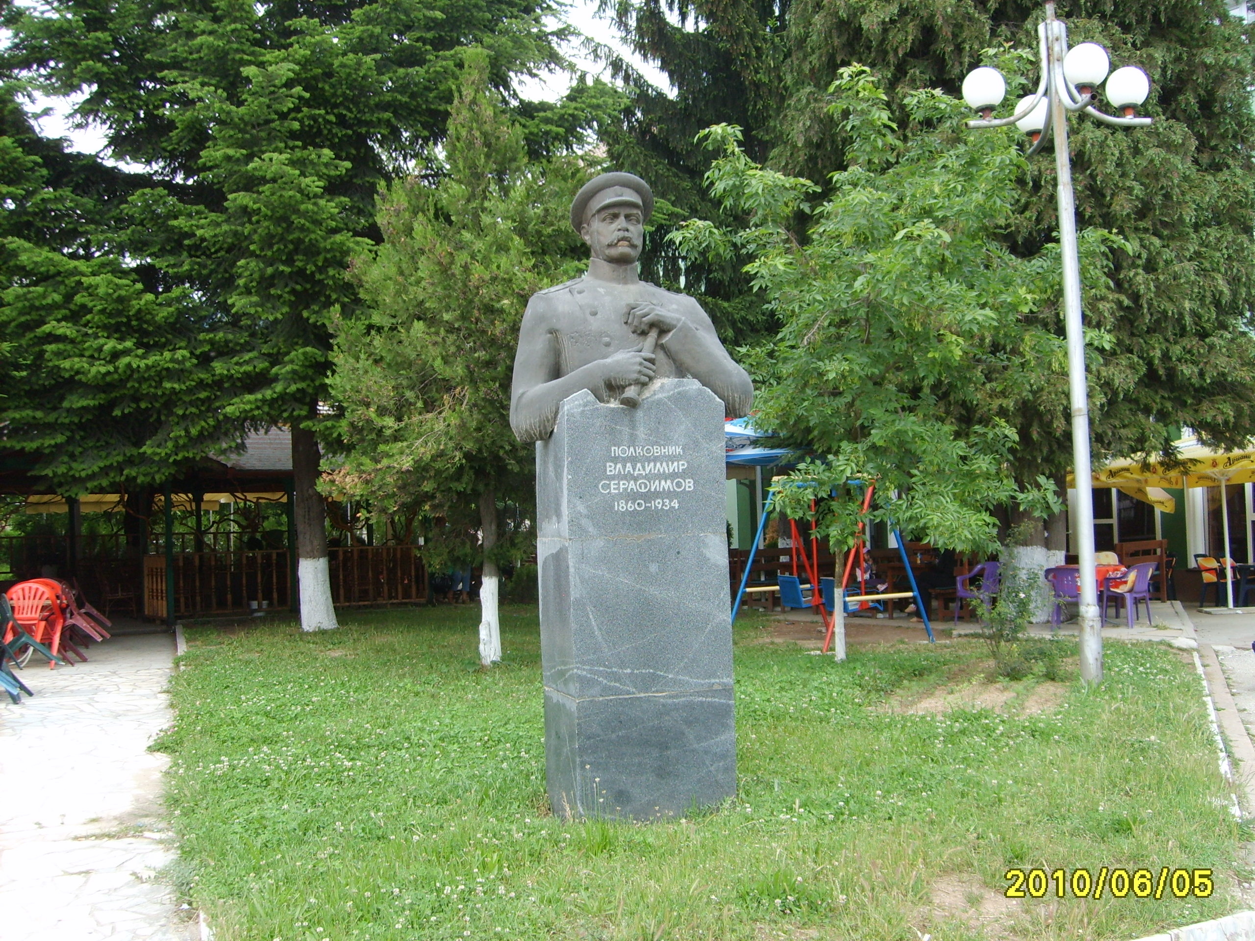 Паметник на полковник Серафимов в Рудозем.